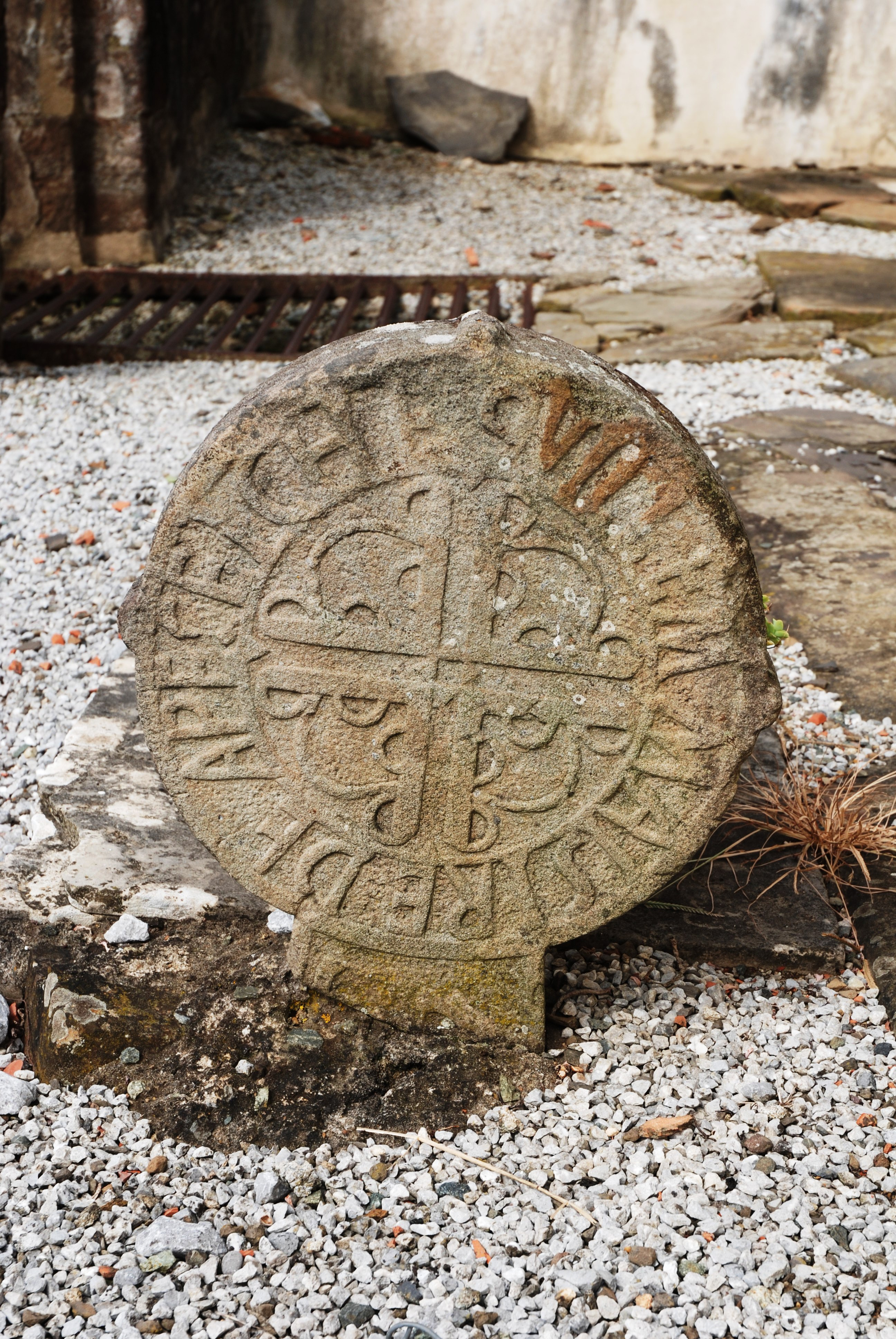 Stèle discoïdale dans le cimetière de Succos